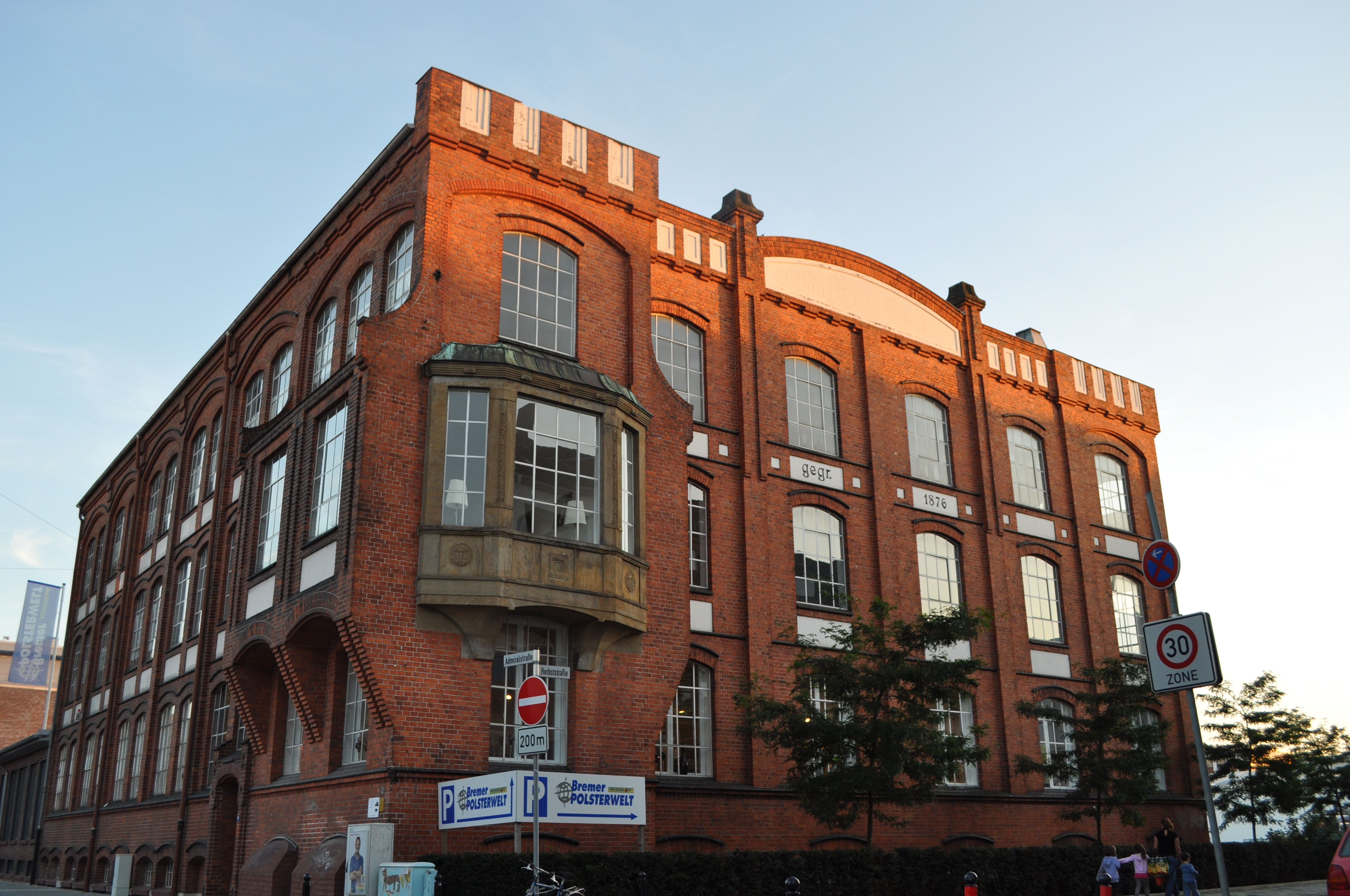 Bremer Stuhlrohr-Fabrik Menck, Schultze, Co. in Bremen, Admiralstraße 96.Das abgebildete Objekt ist ein geschütztes Kulturdenkmal in der Freien Hansestadt Bremen, mit der Nr. 1877 beim Landesamt für Denkmalpflege registriert.